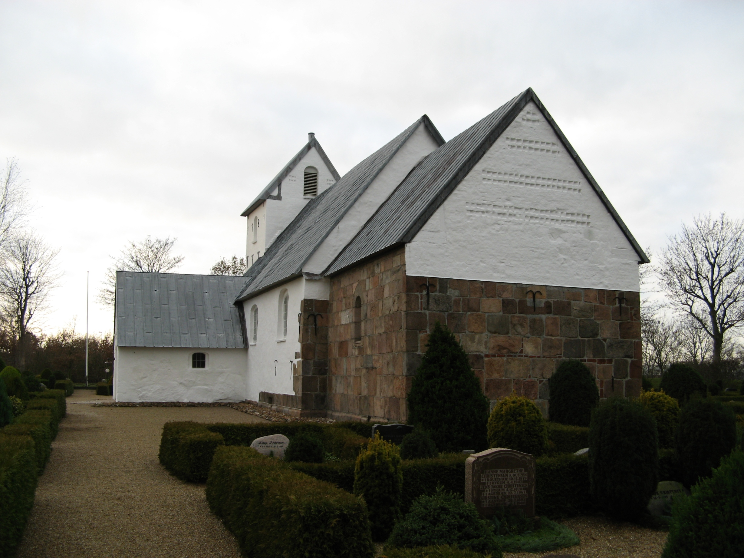 Vester Nebel Kirke, Vester Nebel sogn, Esbjerg kommune (former: Skads Herred, Ribe Amt). Kirken set fra sydøst